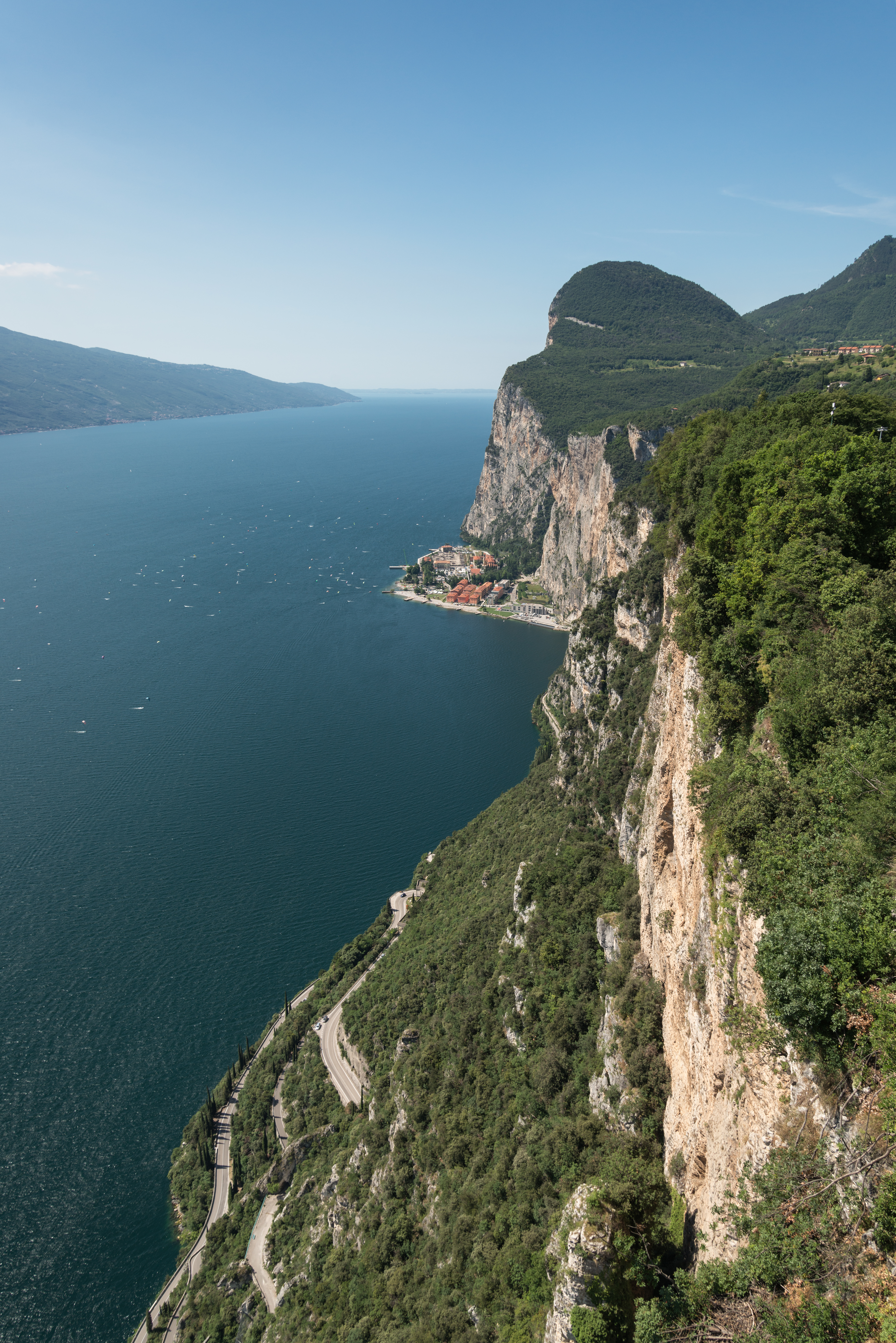 Campione del Garda - Terrazza del brivido, Tremosine, Brescia, Italia